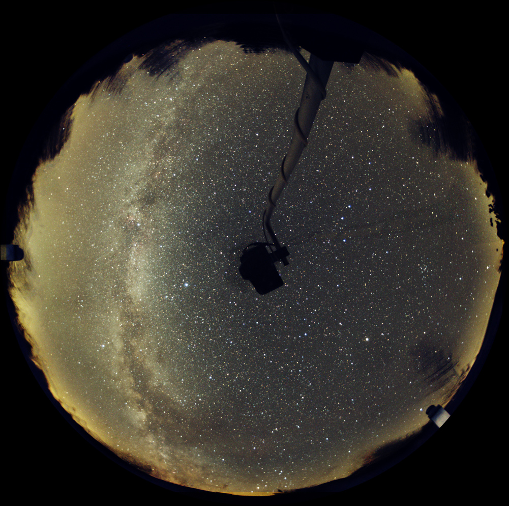 Na snímku je patrné světelné znečištění při obzoru, ale také poměrně tmavé nebe nad hlavou. Bohužel obloha zde již není úplně temná, jako v odlehlých oblastech světa (pouště, vysoká pohoří).